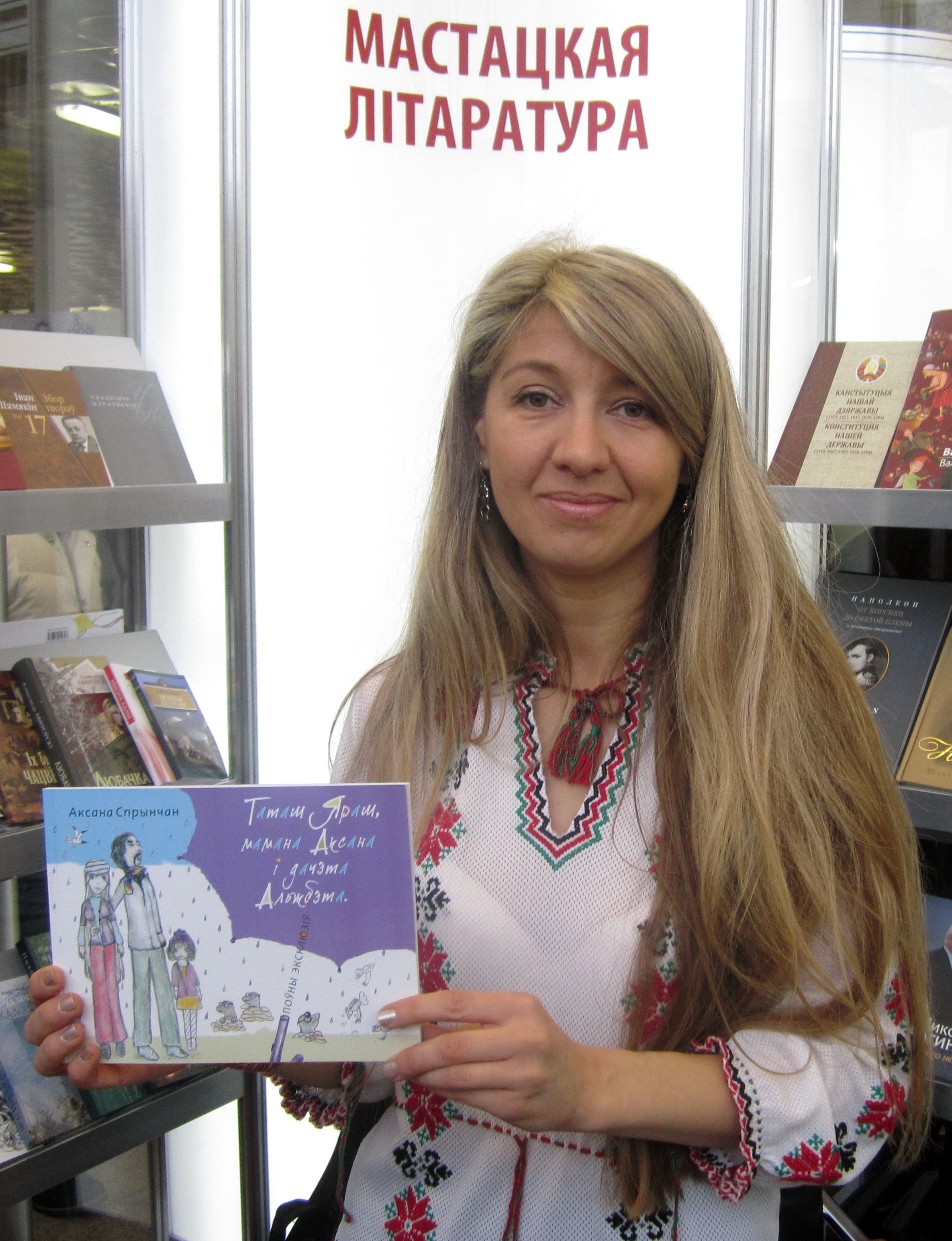 Аксана Спрынчан — беларуская пісьменніца. XXI Міжнародная кніжная выстава (Мінск, 08.02.2014)